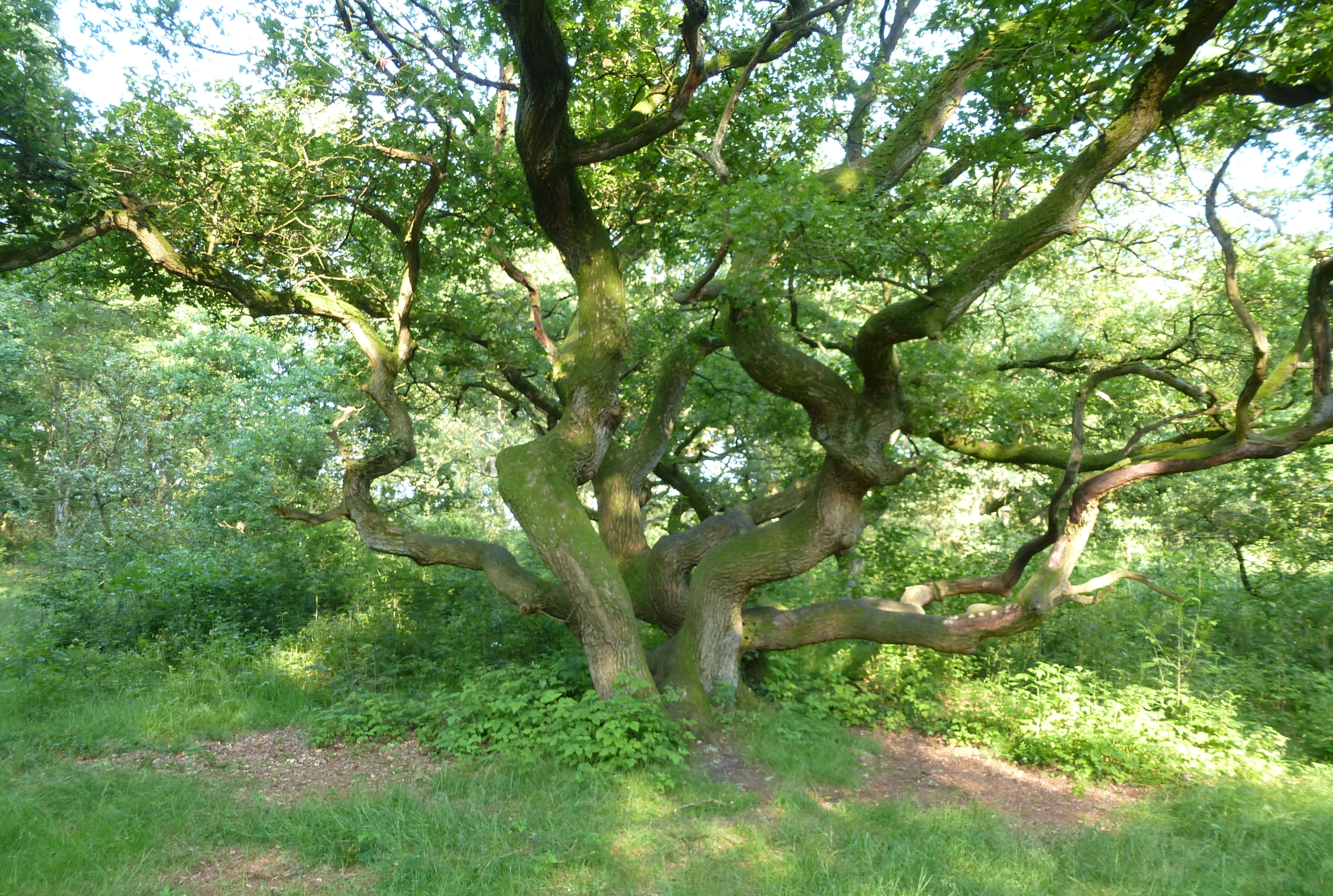 Kratteichen am Holzberg nahe Buchholz, Landkreis Rotenburg (Wümme)